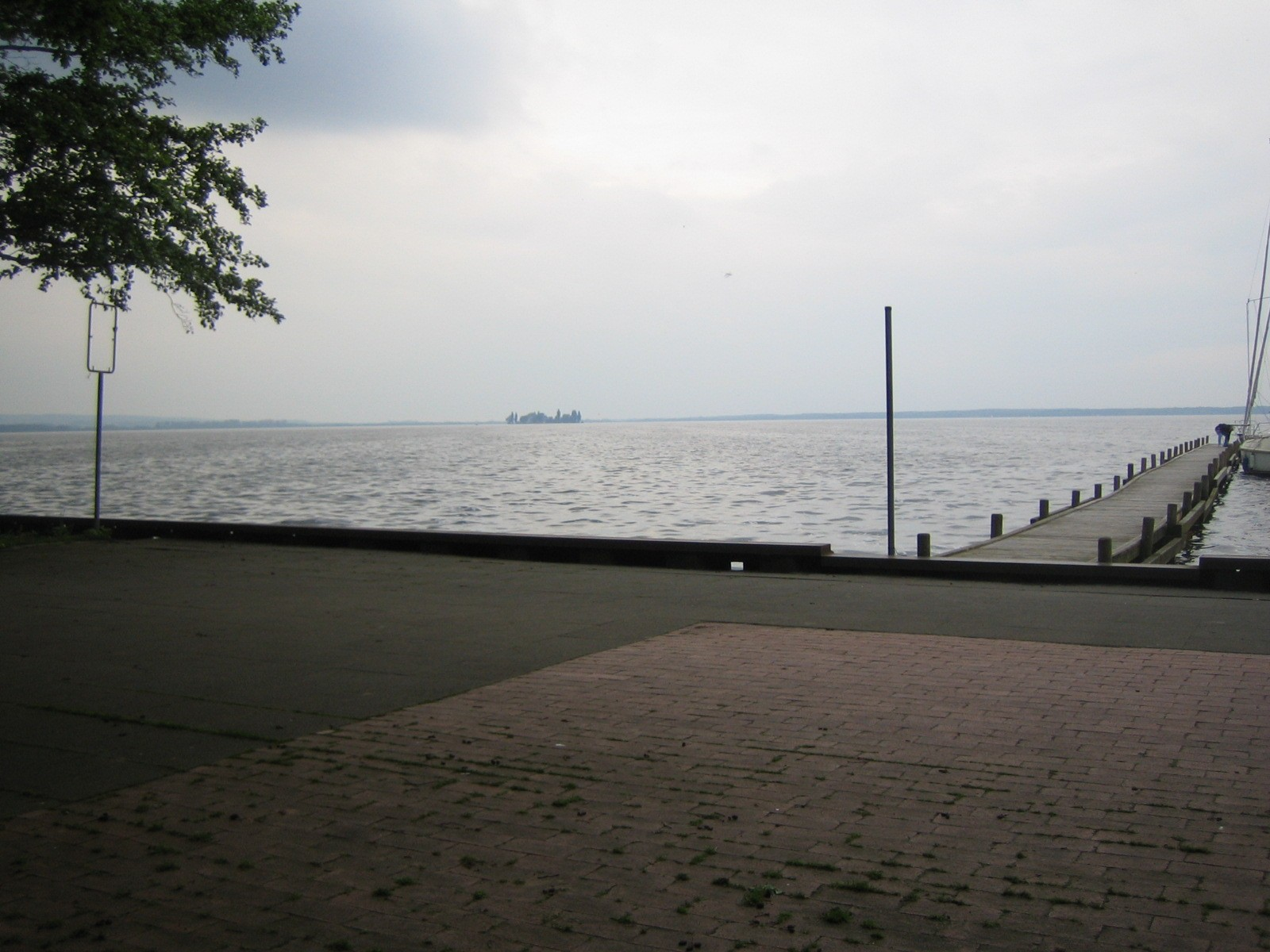 Festung Wilhelmstein im Steinhuder Meer, von Steinhude aus gesehen Template:Fort Wilhelmstein in Lake Steinhude ( Steinhuder Meer ), seen from the resort of Steinhude, Lower Saxony, Germany